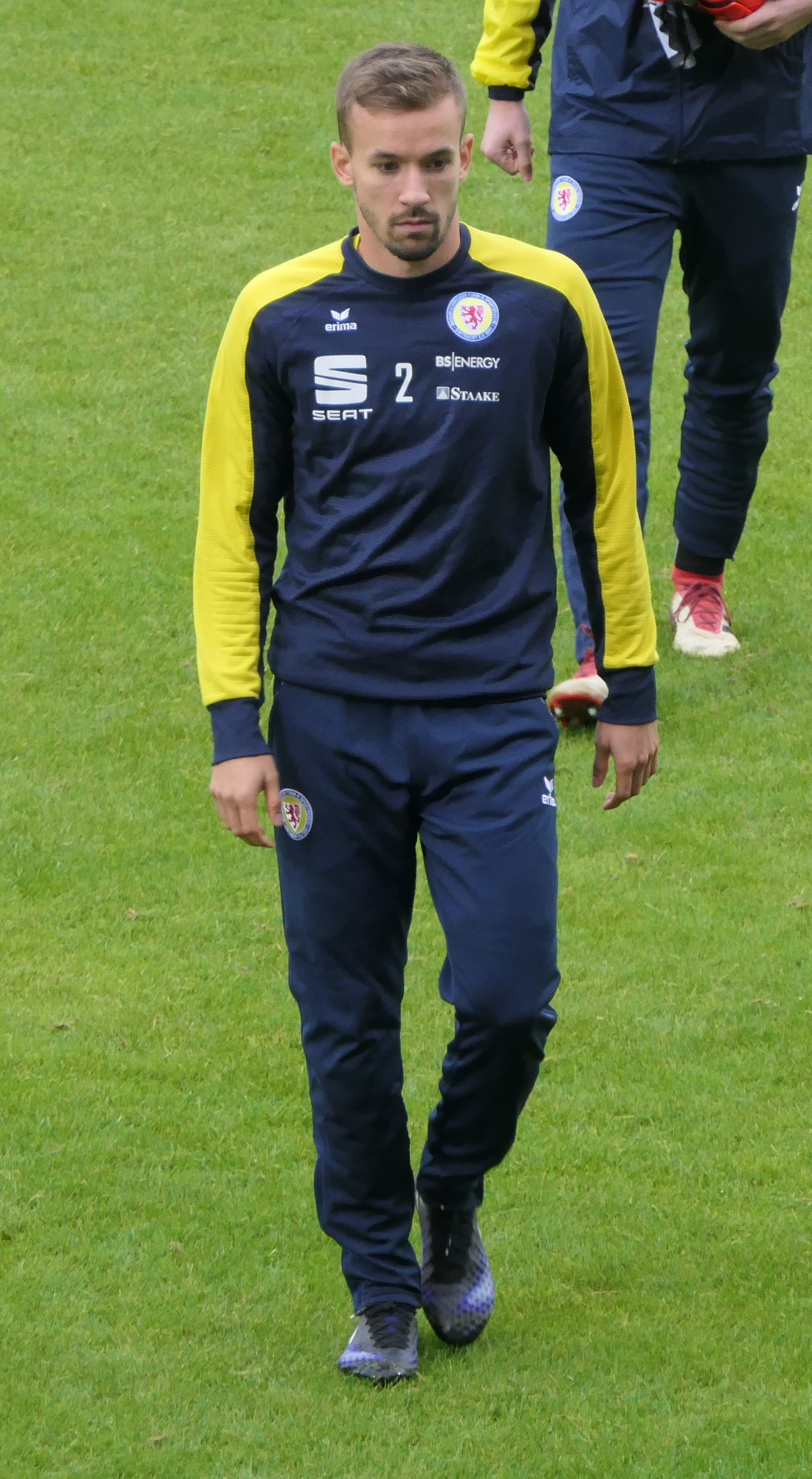 Der Fussballprofi David Sauerland im Trikot von Eintracht Braunschweig beim Auswärtsspiel bei der SpVgg Unterhaching am 01.09.2018.